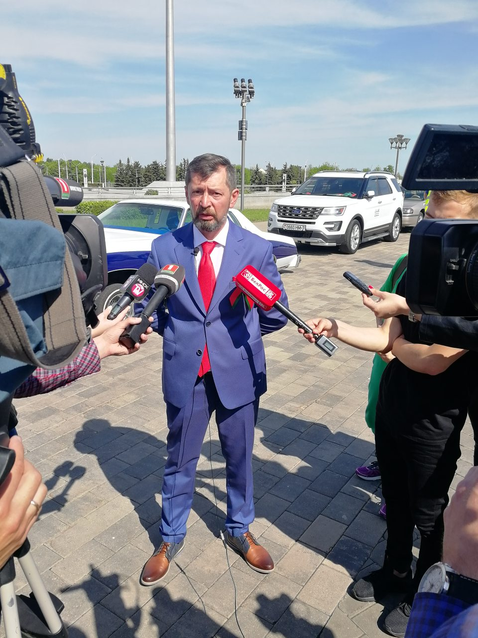 А. Шурин на пресс-конференции на слете Ретро-Минск-2019